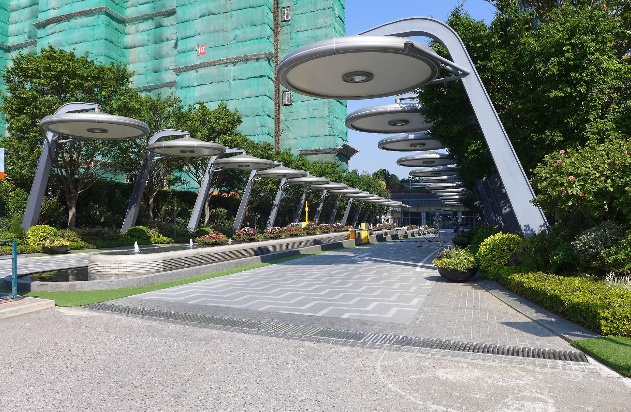 Double Cove Entrance Piazza